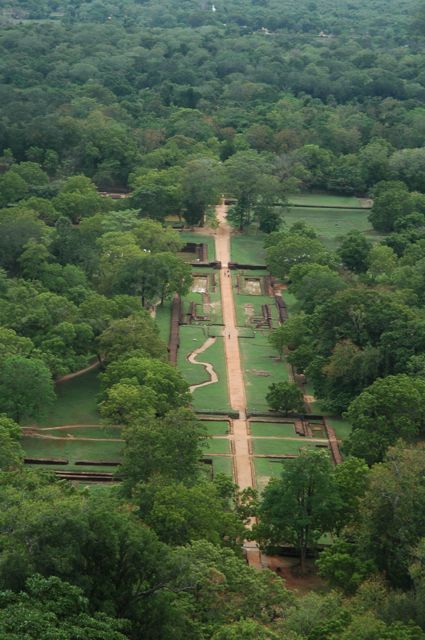 Sigiriya gardens